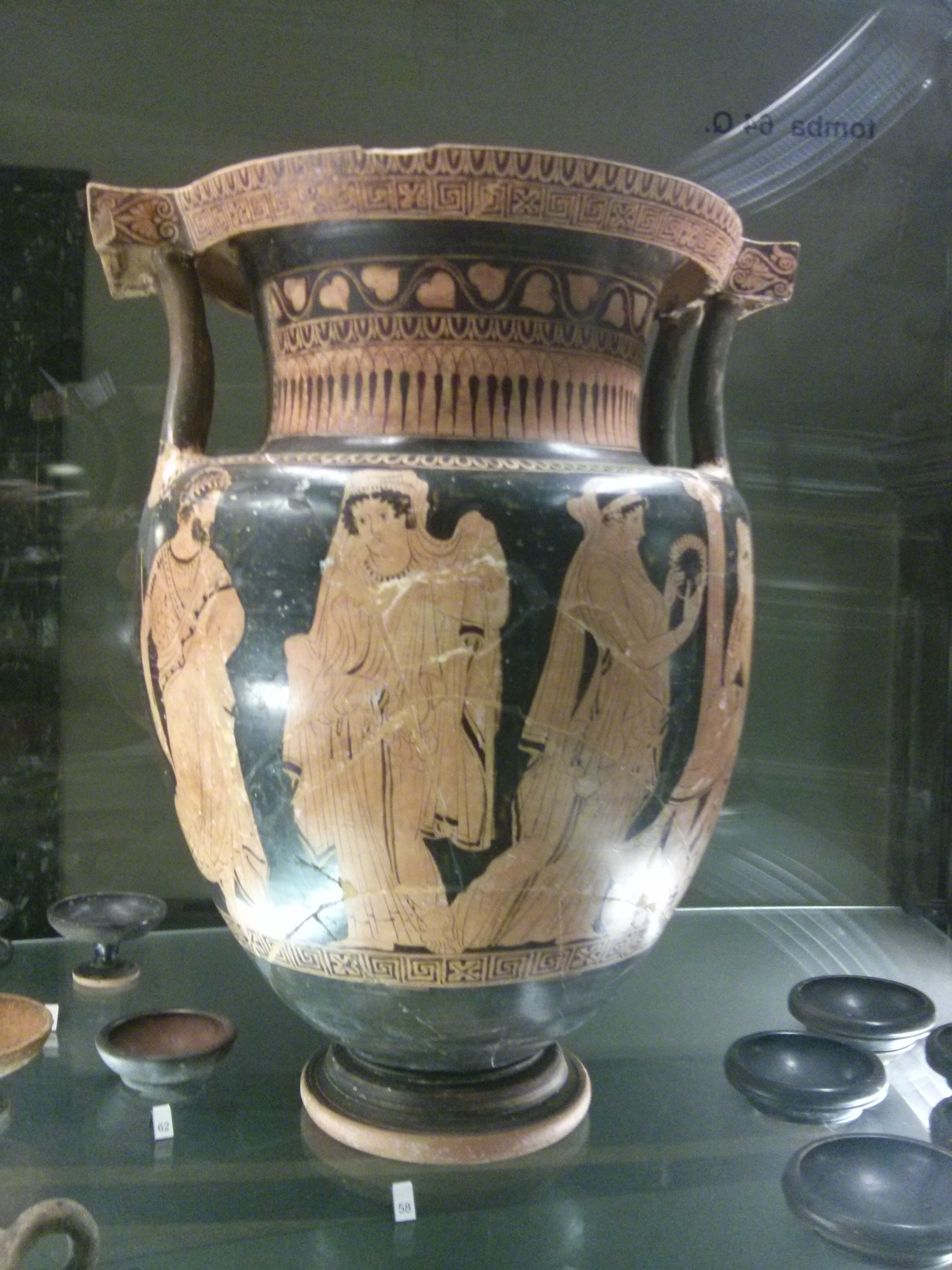 Museo Archeologico Nazionale delle Marche - MIBAC This is a photo of a monument which is part of cultural heritage of Italy.